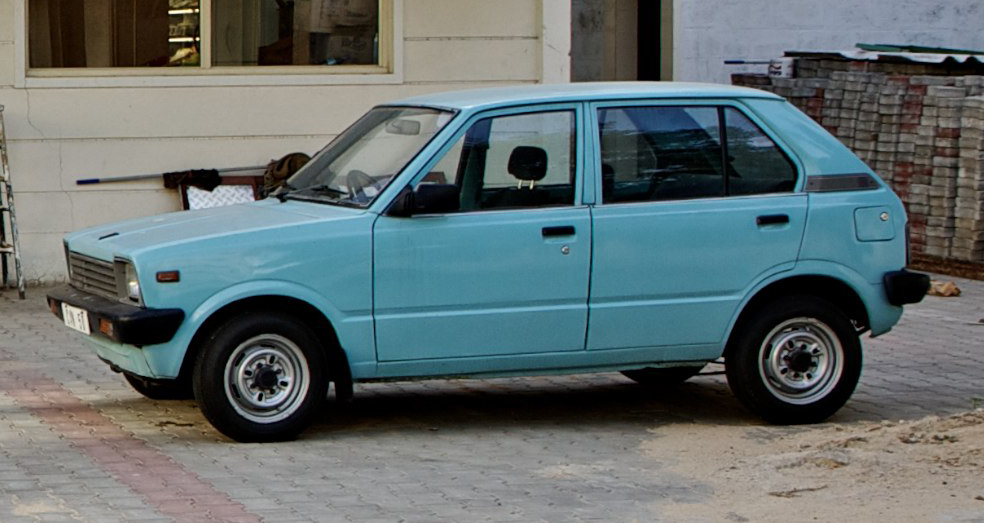 First generation Maruti 800 DX